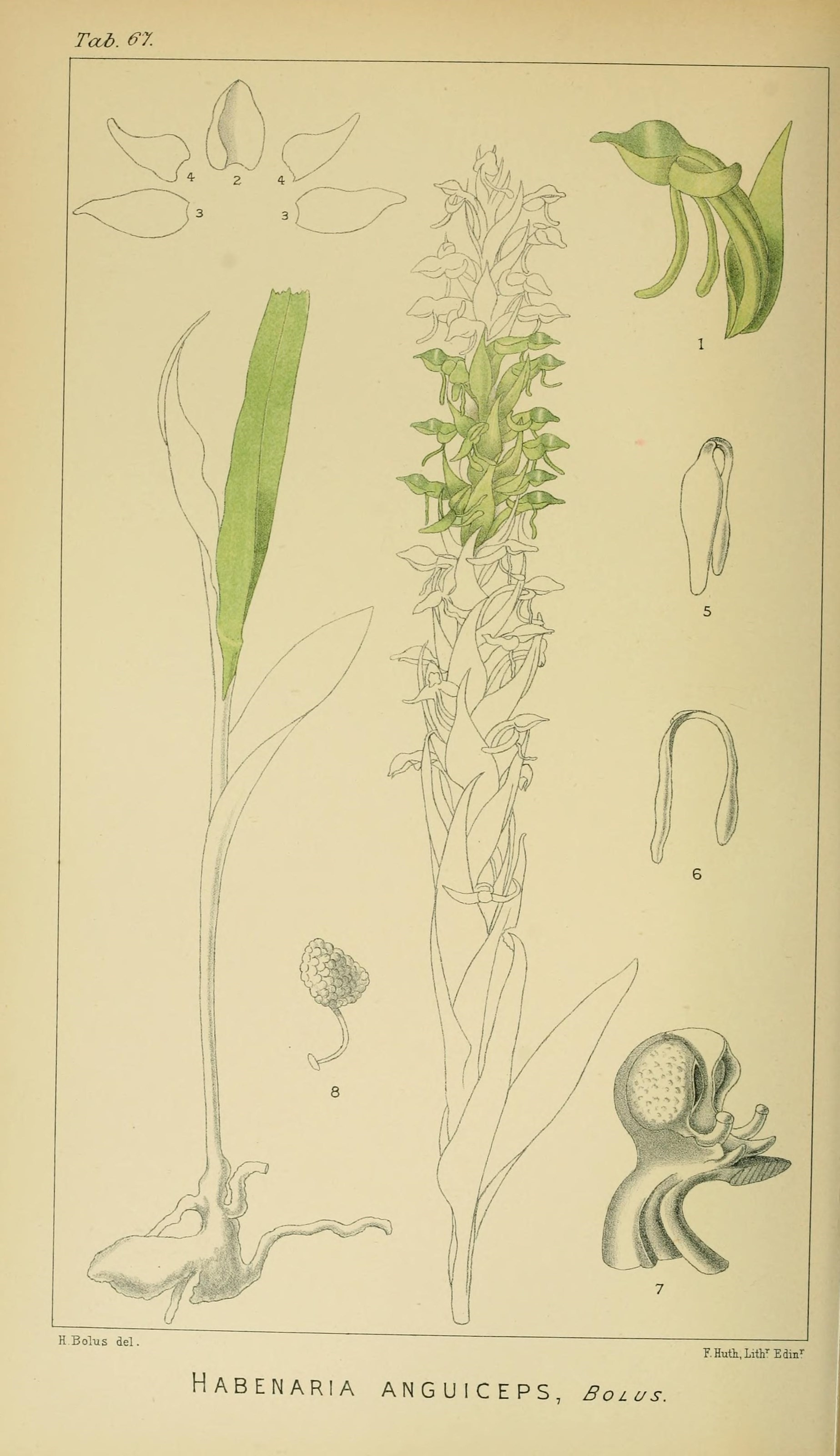 Tccb. &7. H Bolus del r,Hutli,LithEdiii'" HABENARIA ANGUICEPS, Bol us.